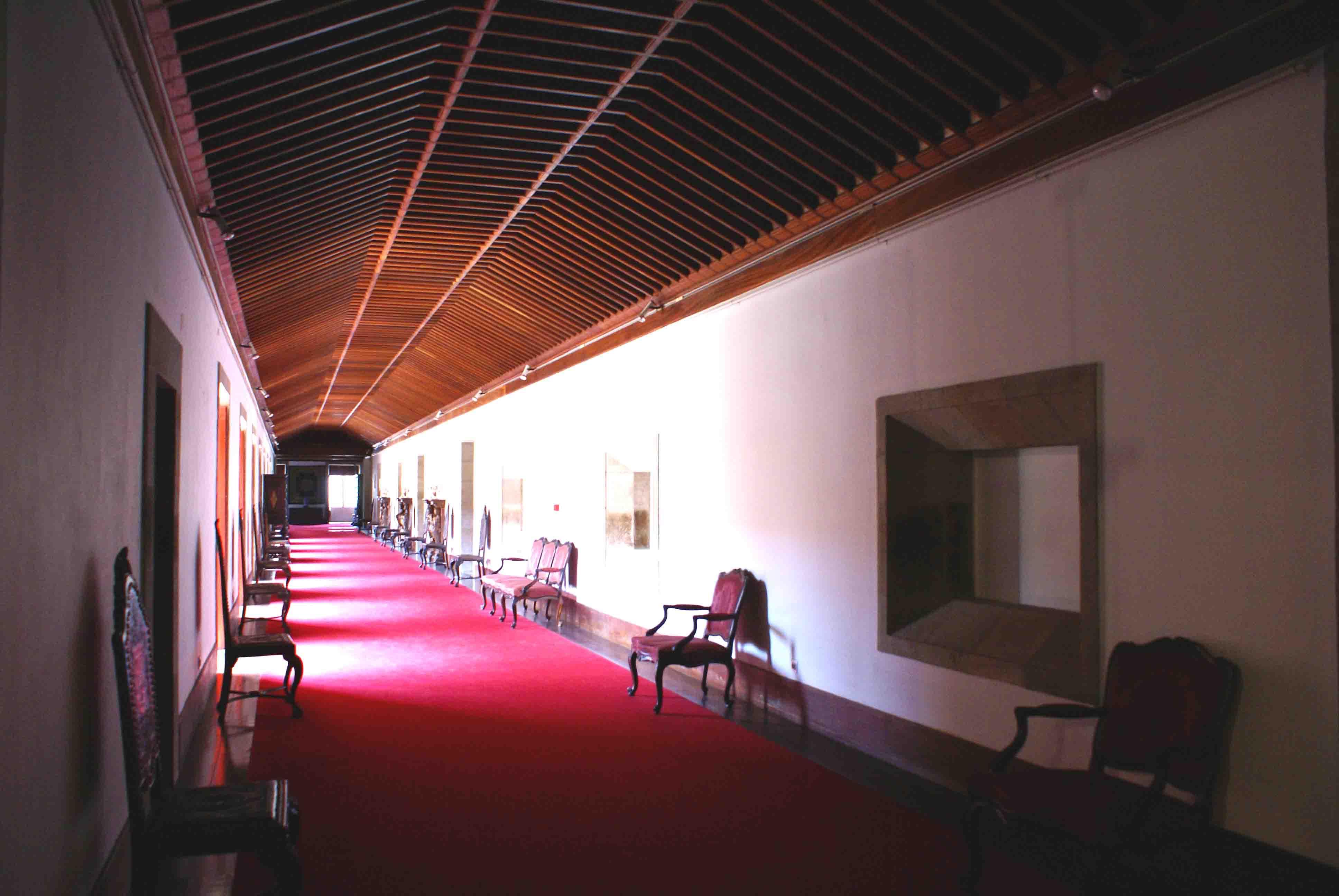 Palácio dos Capitães Generais, corredores, ilha Terceira, Açores, Portugal.